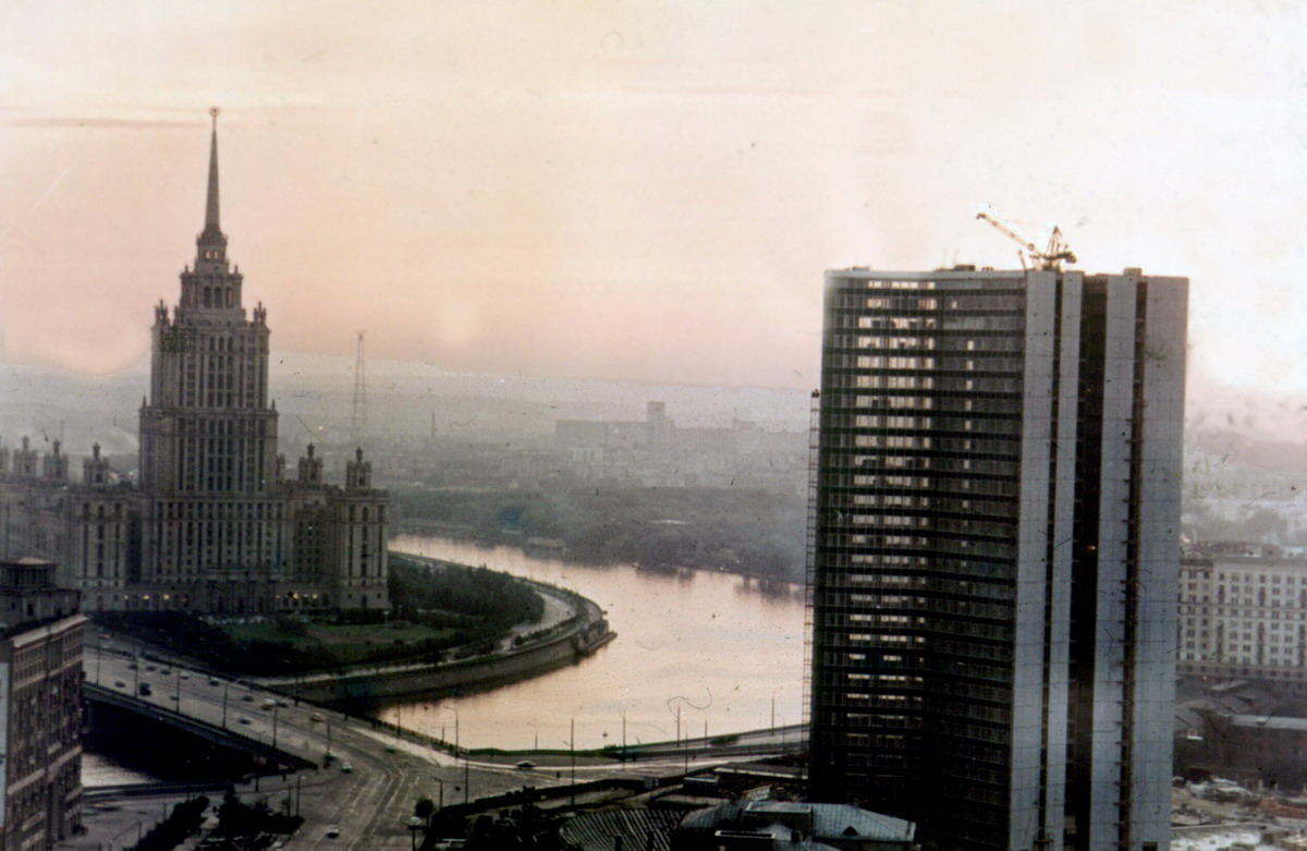 Москва 1970